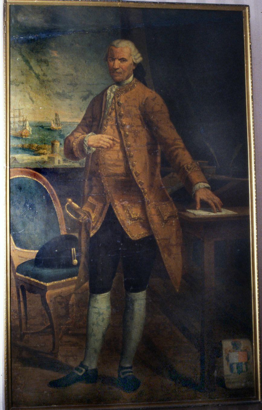 Manuel Tramullas. Retrat de Salvador de March i Bellver.